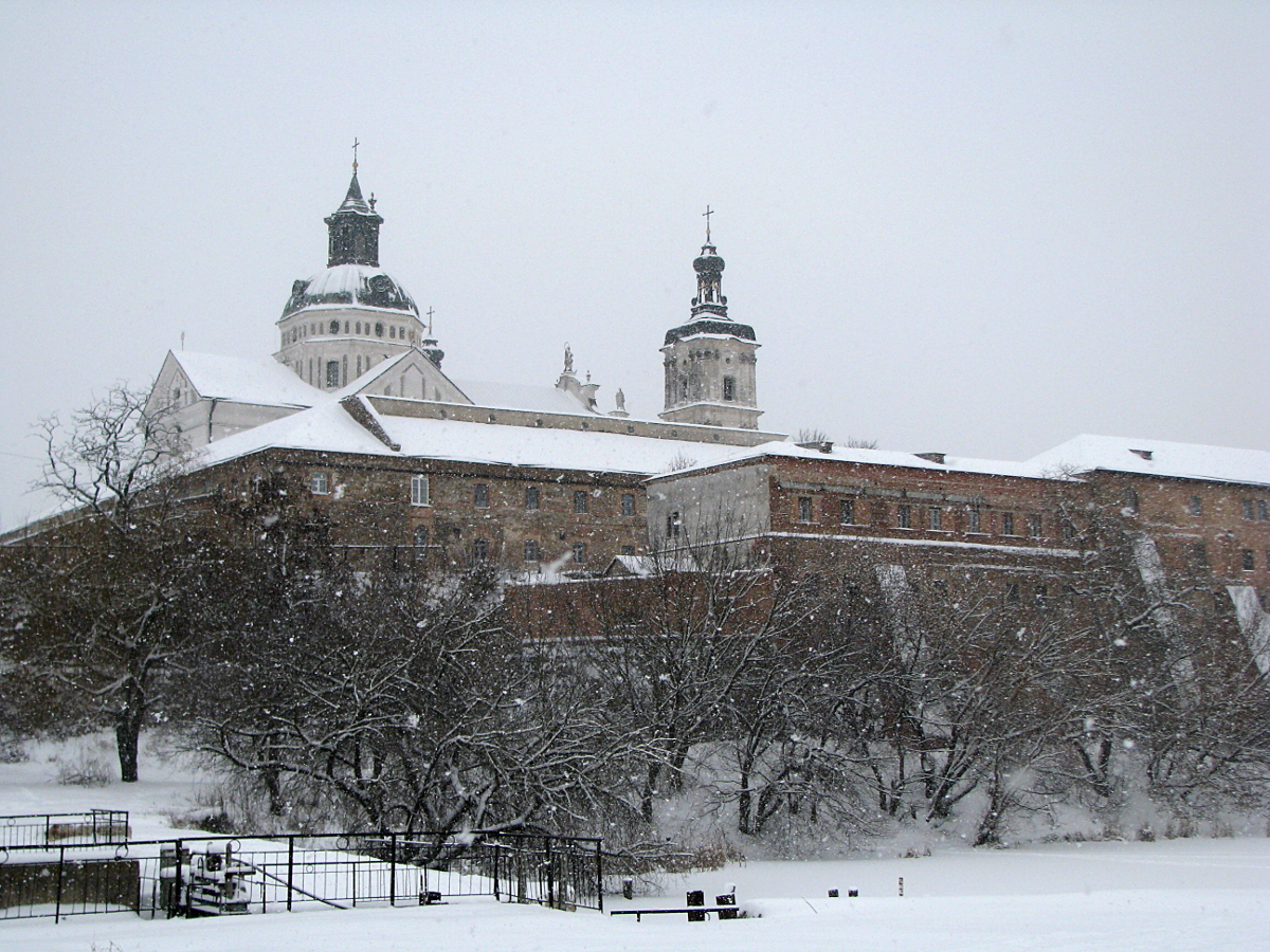 Бердичів, монастир-фортеця Кармелітів Босих, заснований у 1627 році